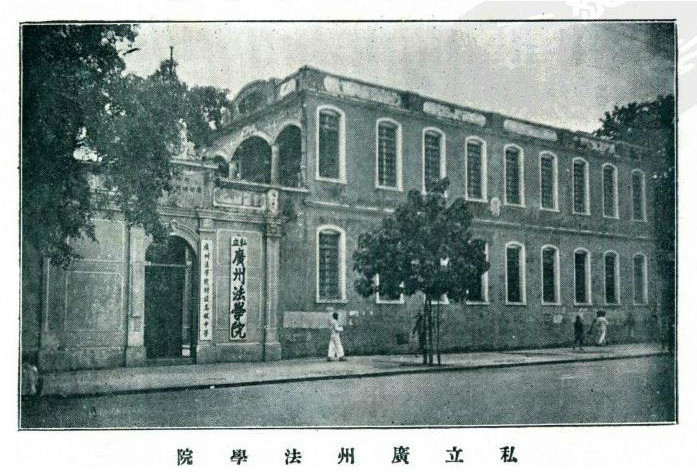 中文（台灣）: 私立廣州法學院